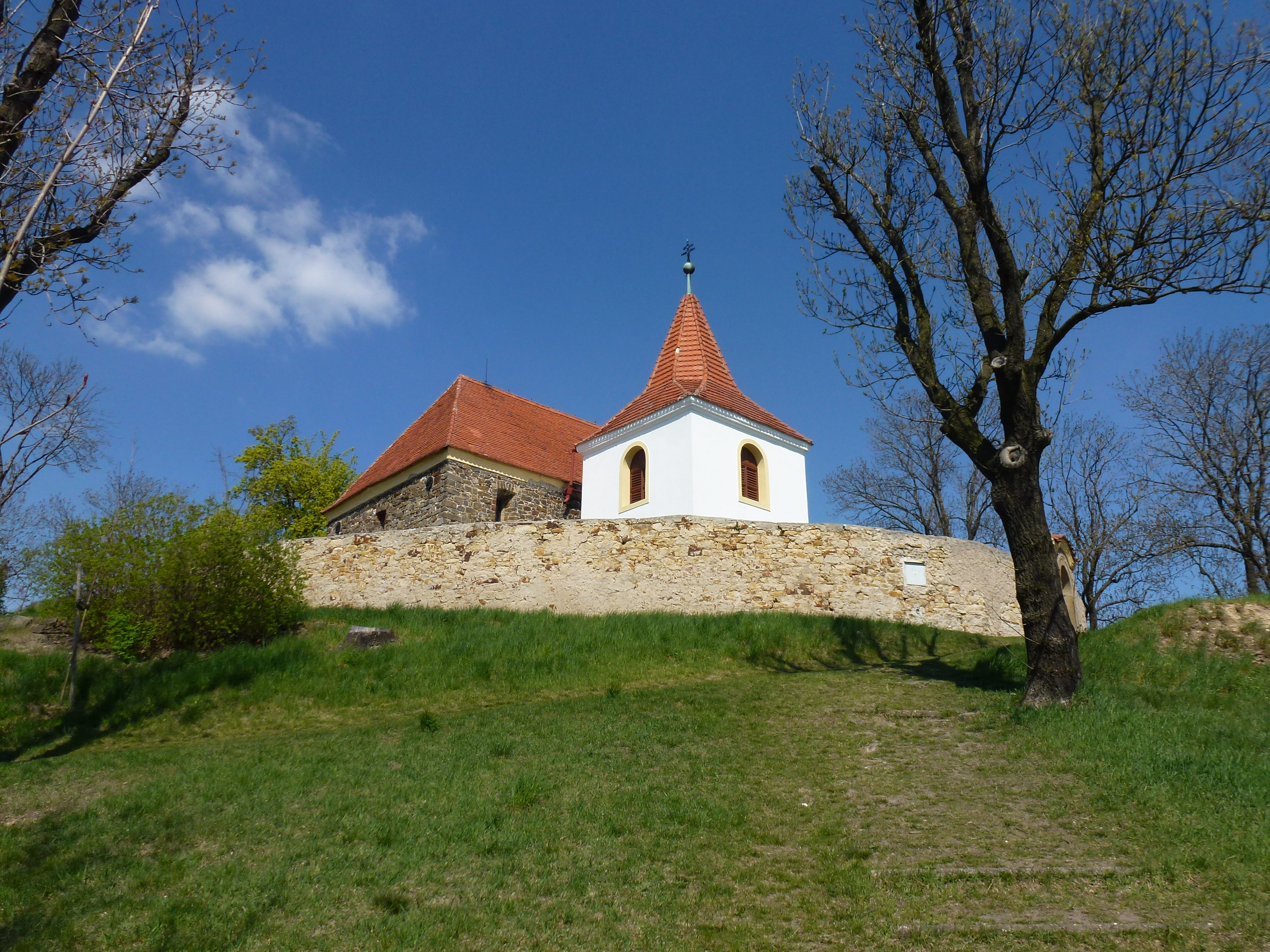 Pohled na kostel